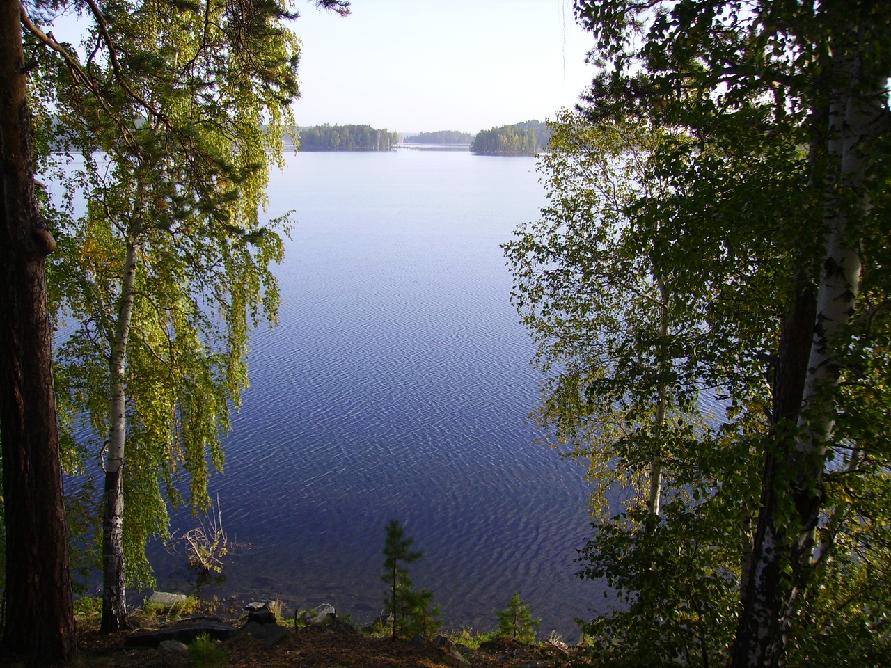 Uvildhi lake in Chelyabinsk Oblast, Russia